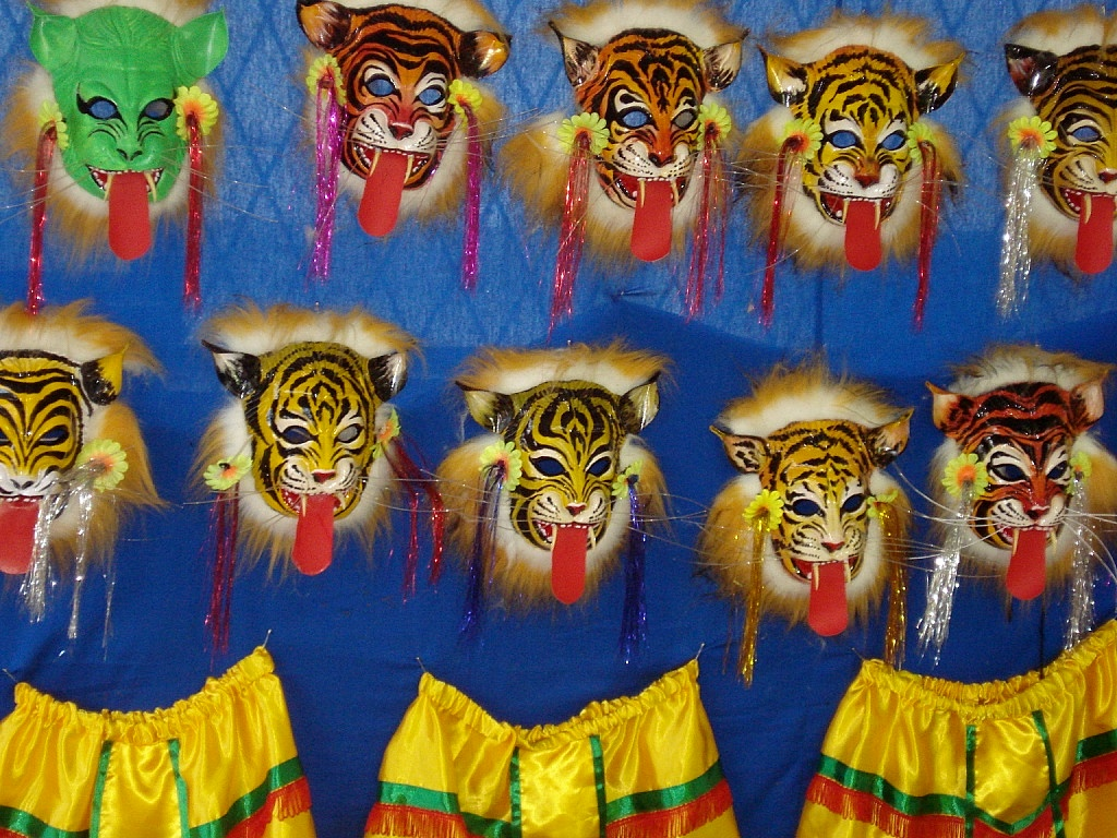 Pulikkali chamayam